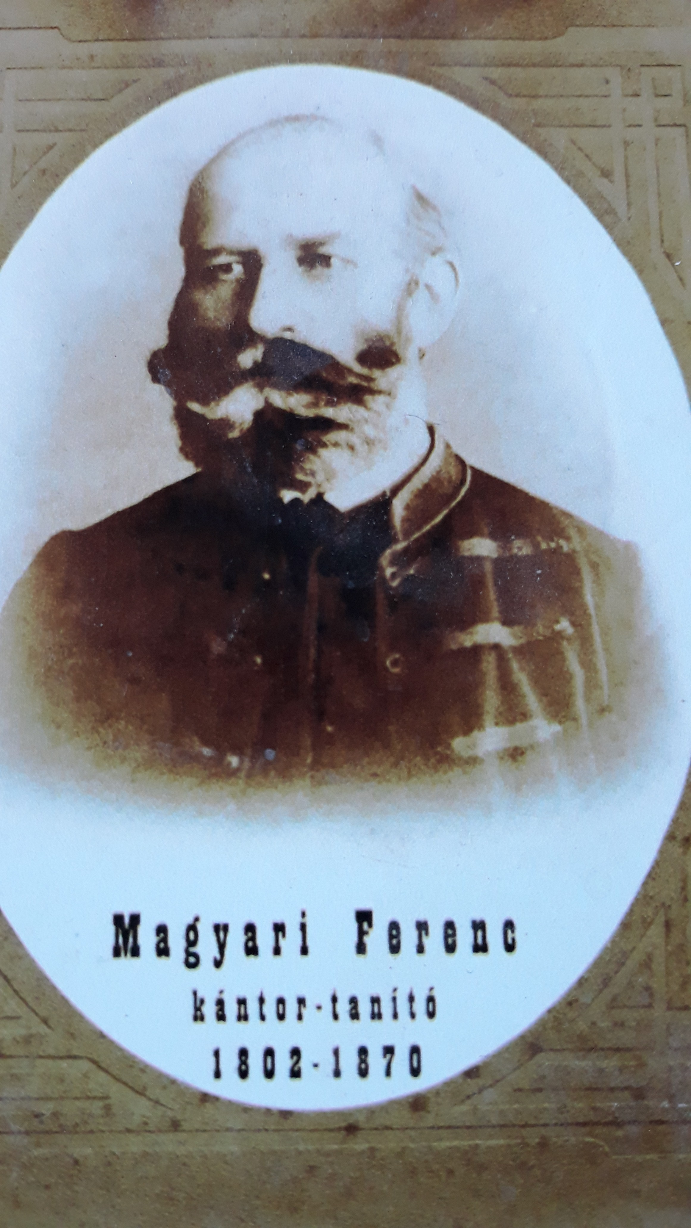 Oroszhegy kántortanítója